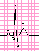 drawn by Sampo